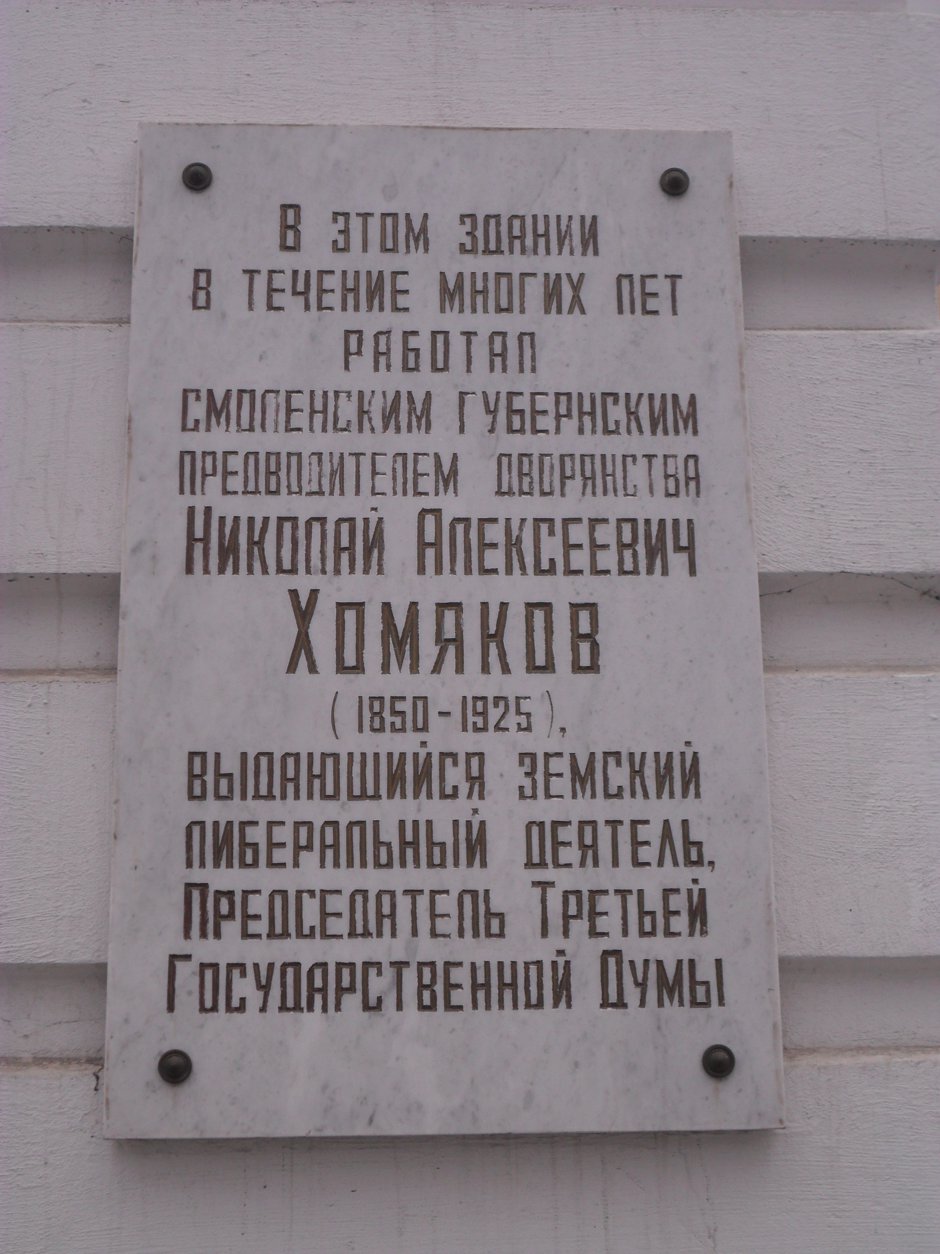 Мемориальная доска государственному деятелю Николаю Хомякову на улице Глинки в Смоленске.